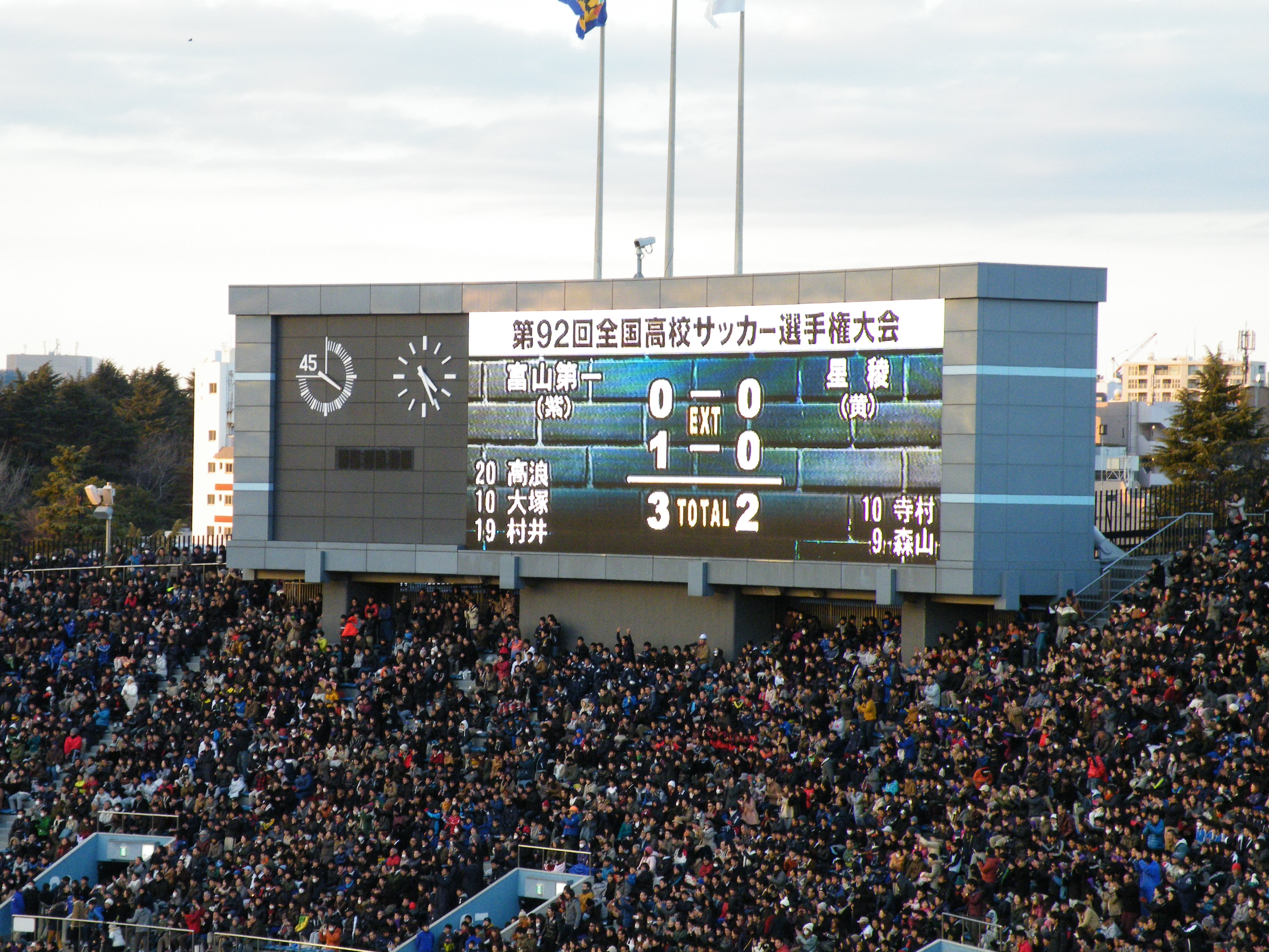 第92回全国高等学校サッカー選手権大会決勝戦のスコア